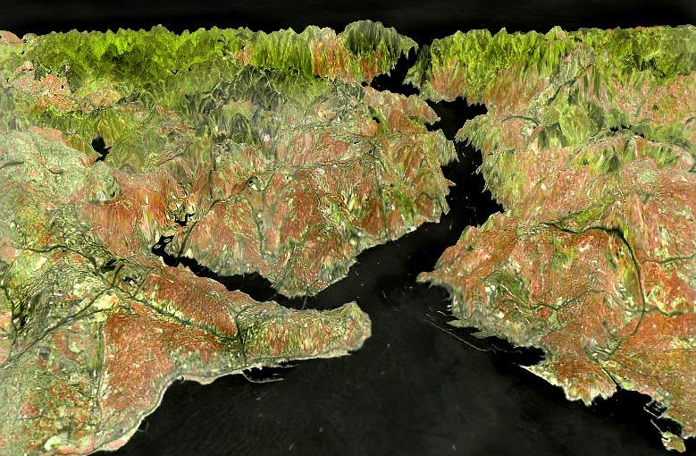 Bosporus Satellietfoto opgemaakt mbv NASA/WordlWind